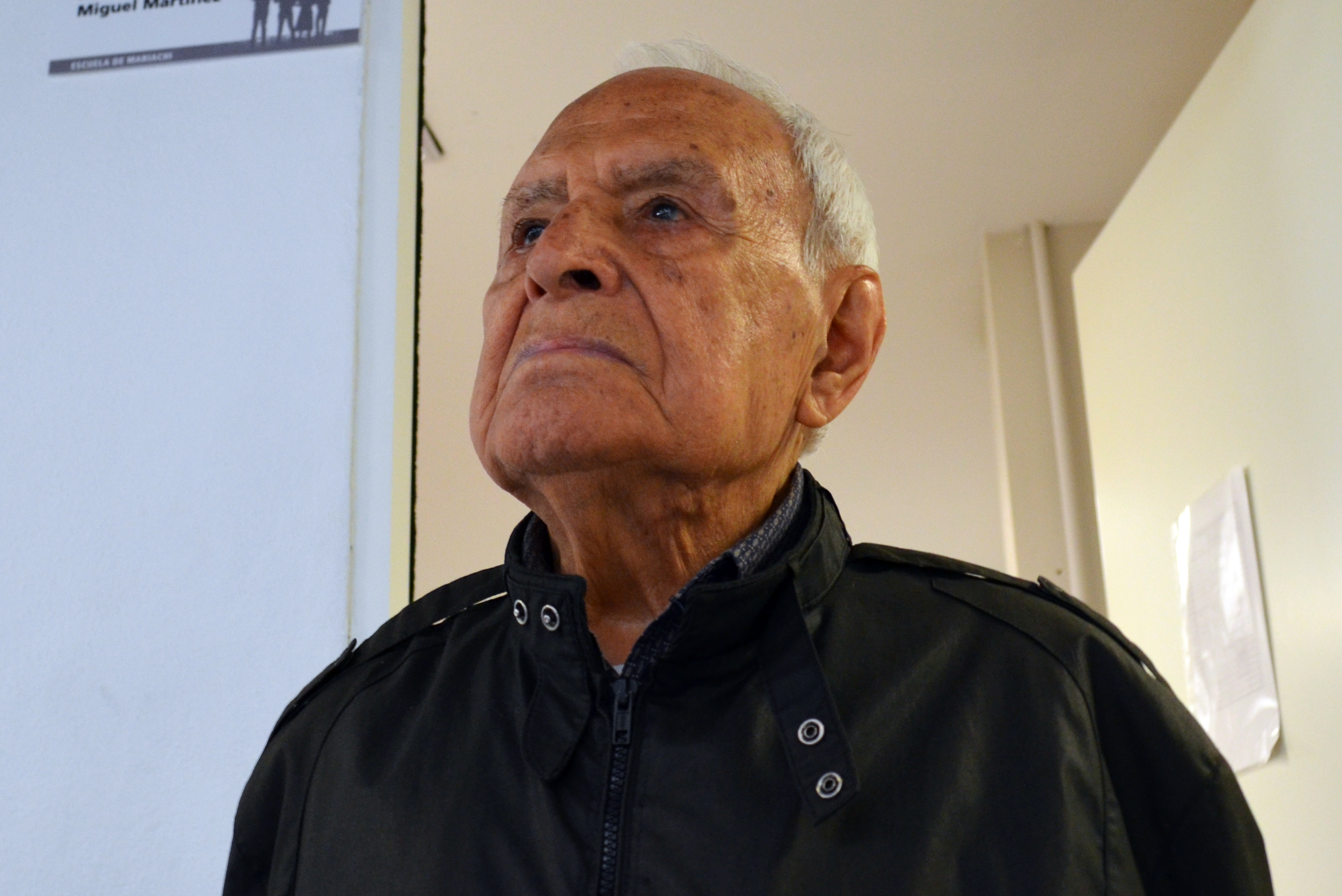 El músico mexicano de mariachi Miguel Martinez Domínguez (1921-2014).